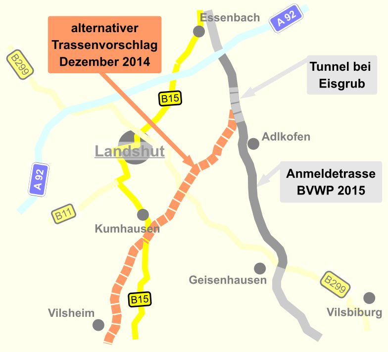 Planungsabschnitt B 15 neu von A92 nach Geisenhausen + Trassenvariante über Kumhausen